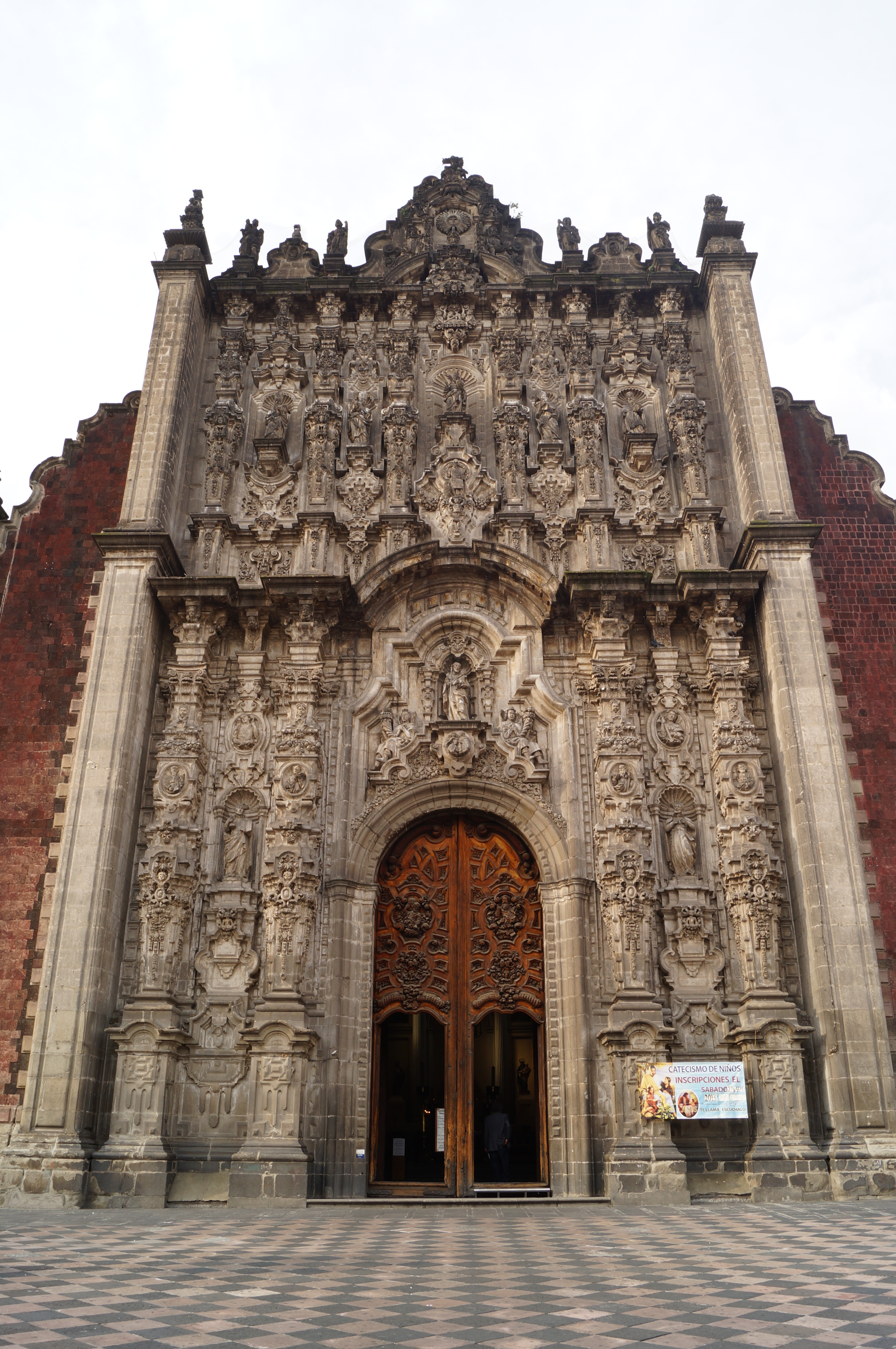 Sagrario Metropolitano